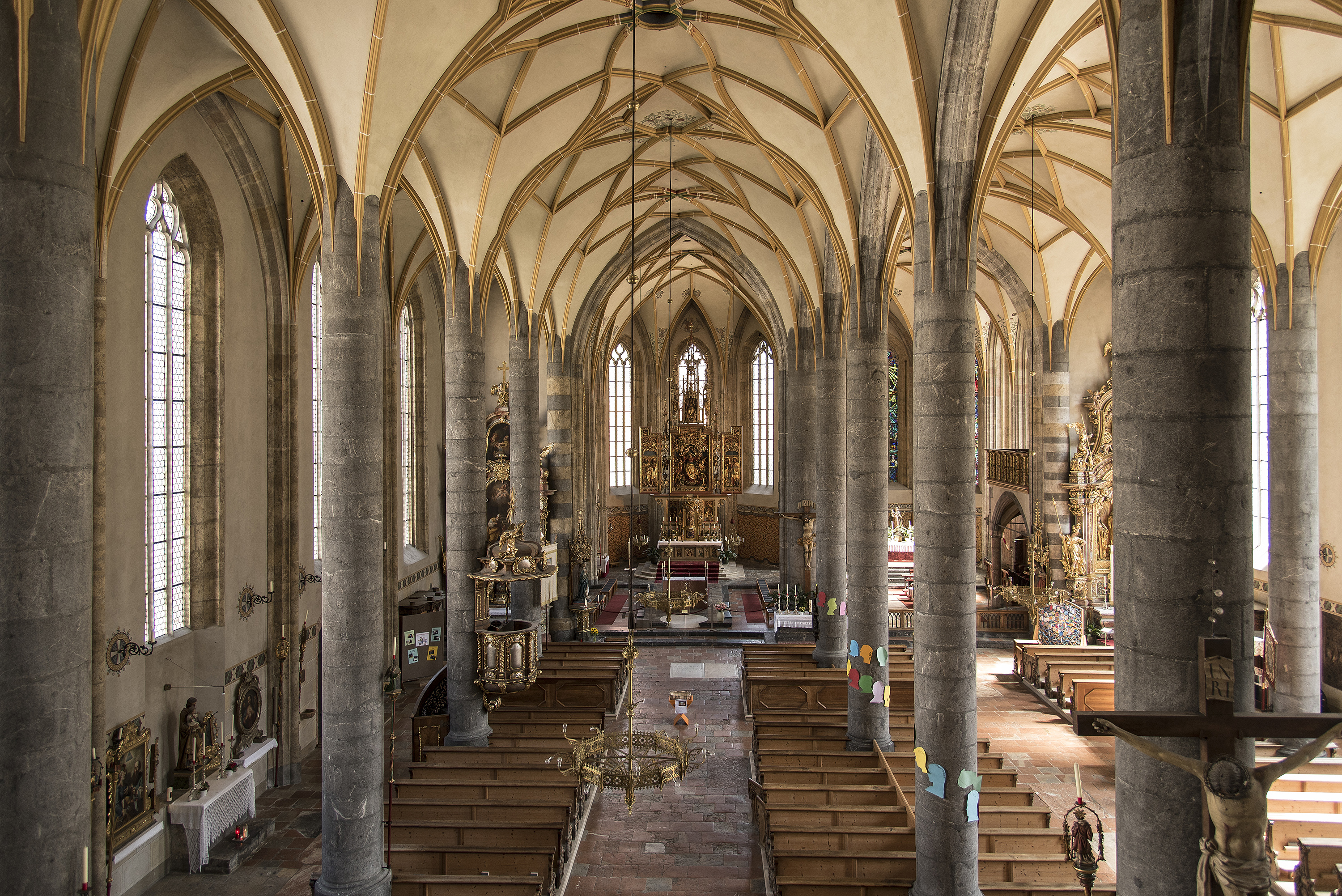 Kath. Pfarrkirche Mariae Himmelfahrt